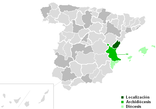 mapa de la Diócesis de Segorbe-Castellón.